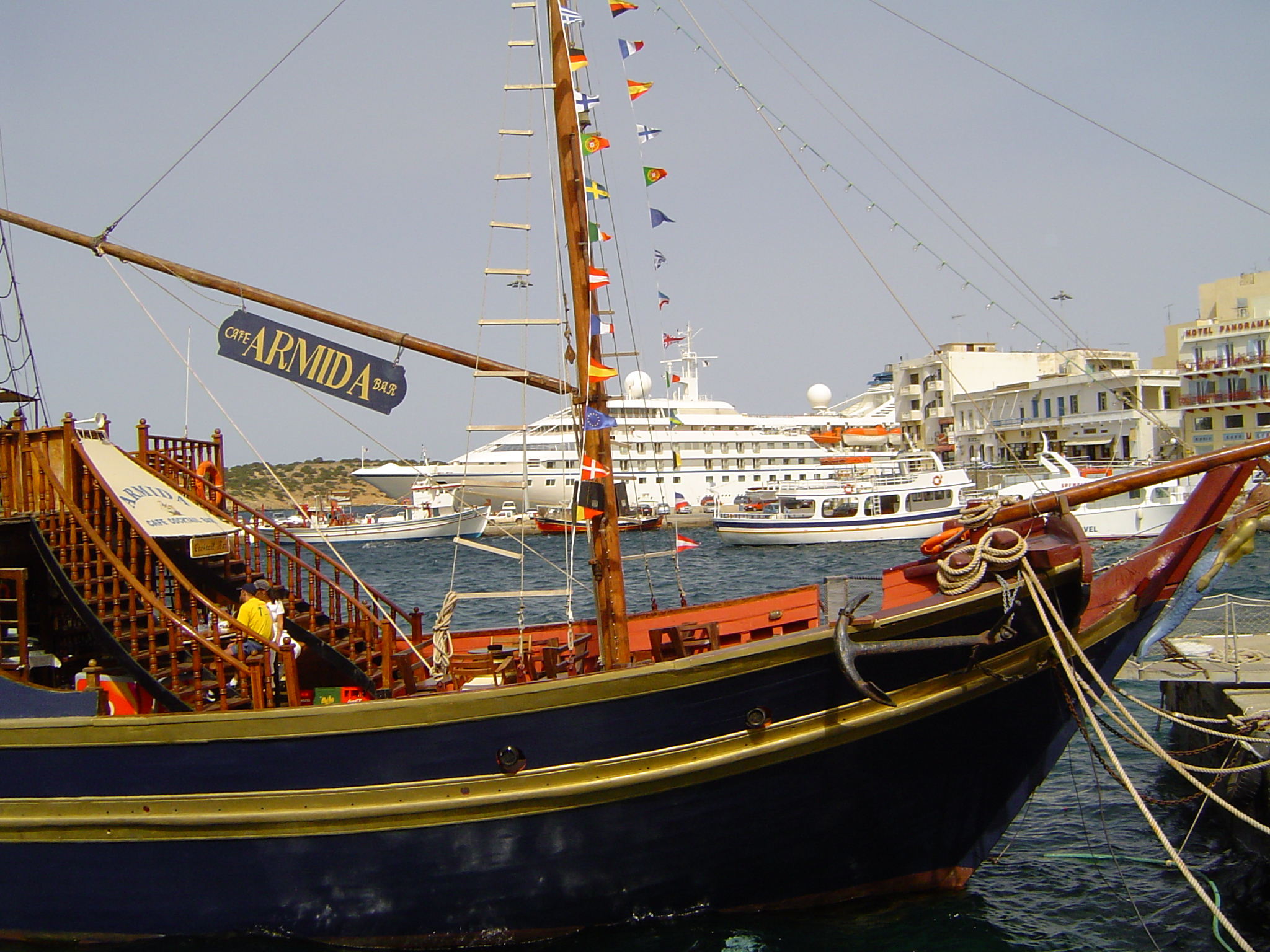 Source: Hafen vun Agios Nikolaios.